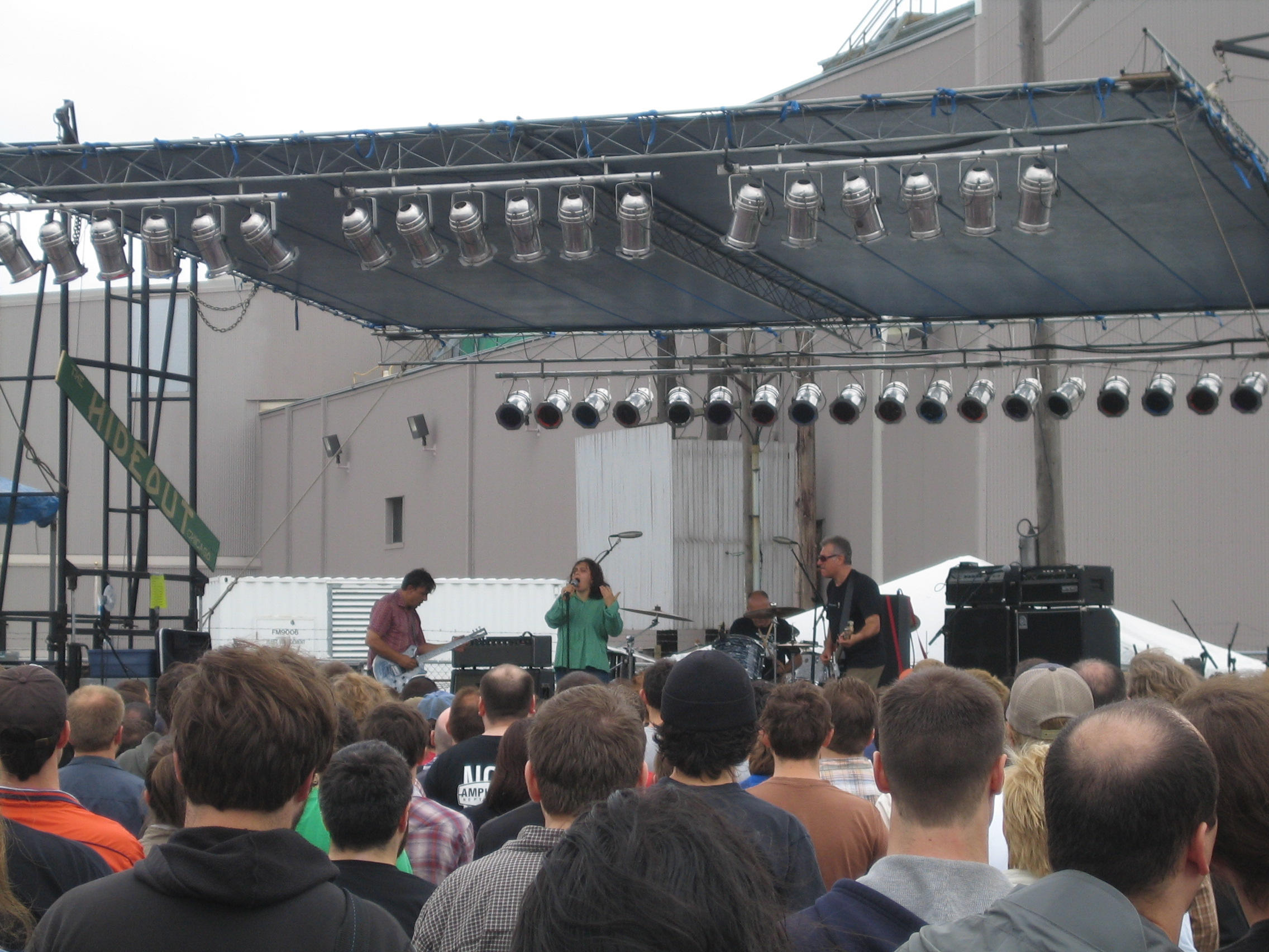 Uzeda en concert à Chicago.